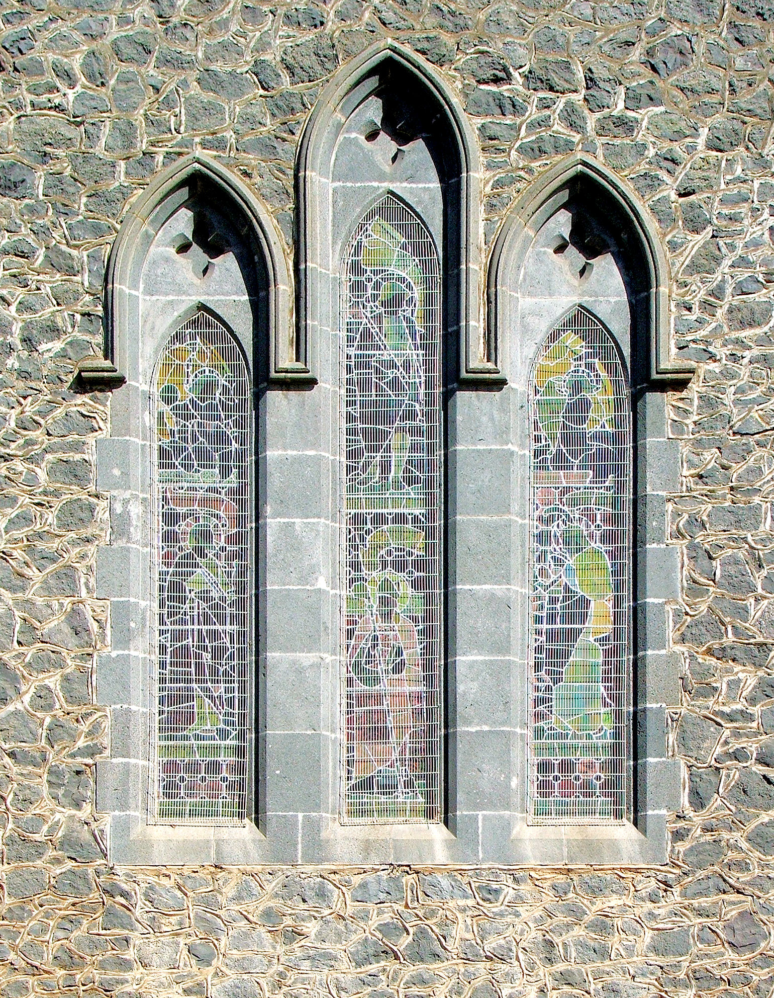 Iglesia inglesa